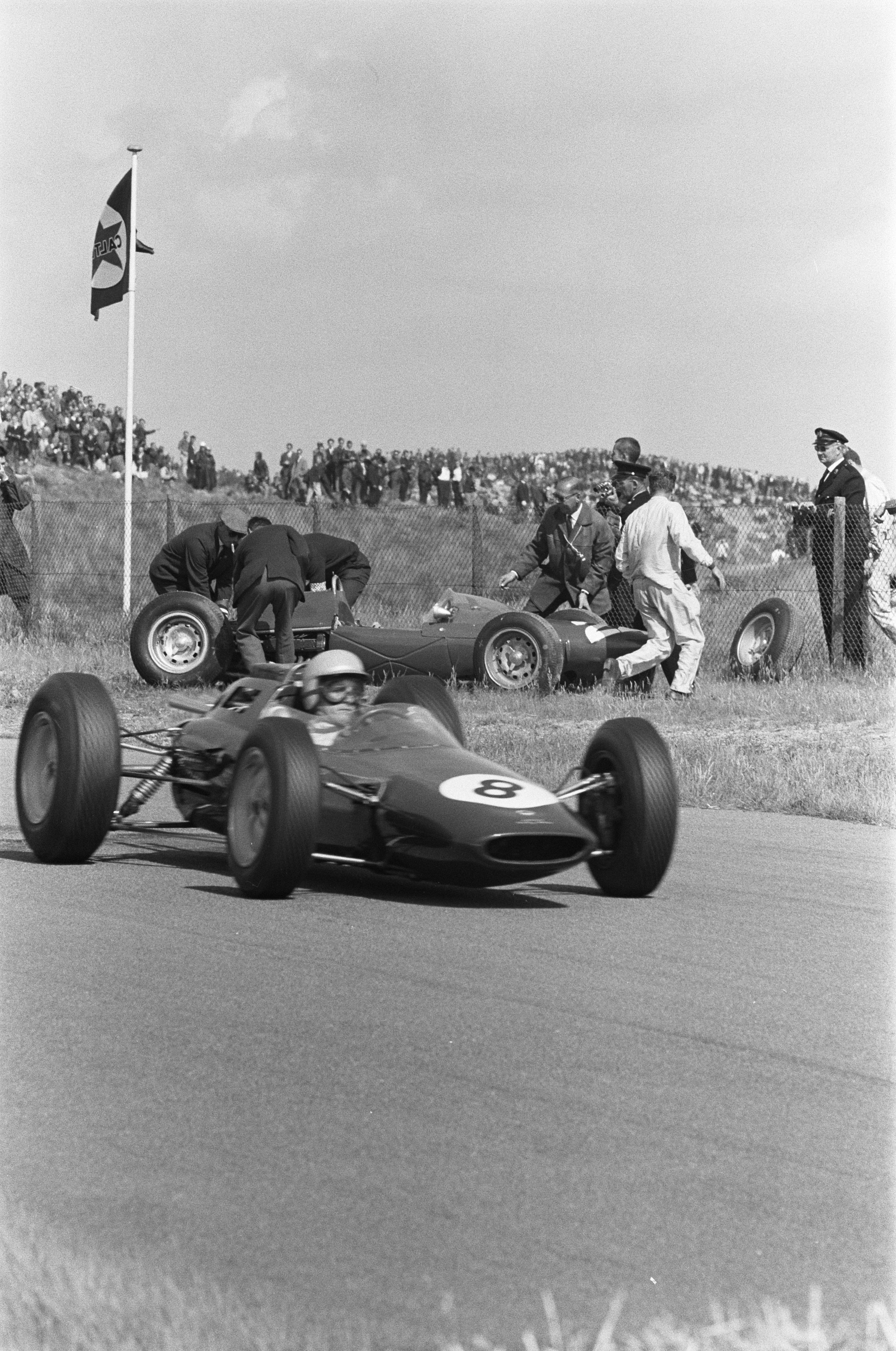 Collectie / Archief : Fotocollectie Anefo Reportage / Serie : [ onbekend ] Beschrijving : Grand Prix te Zandvoort. Nummer 8 Trevor Taylor (Lotus), Nummer 24 Phil Hill (ATS) Datum : 23 juni 1963 Locatie : Noord-Holland, Zandvoort Persoonsnaam : Hill Fotograaf : Pot, Harry / Anefo Auteursrechthebbende : Nationaal Archief Materiaalsoort : Negatief (zwart/wit) Nummer archiefinventaris : bekijk toegang 2.24.01.05 Bestanddeelnummer : 915-2880